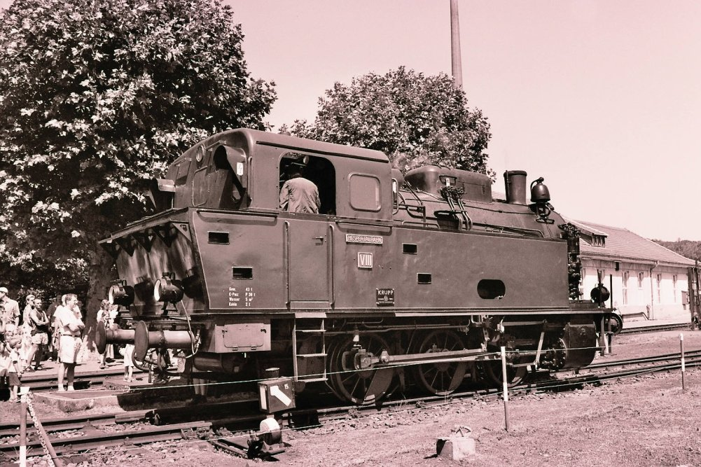 Dampflokomotive der Hespertalbahn.